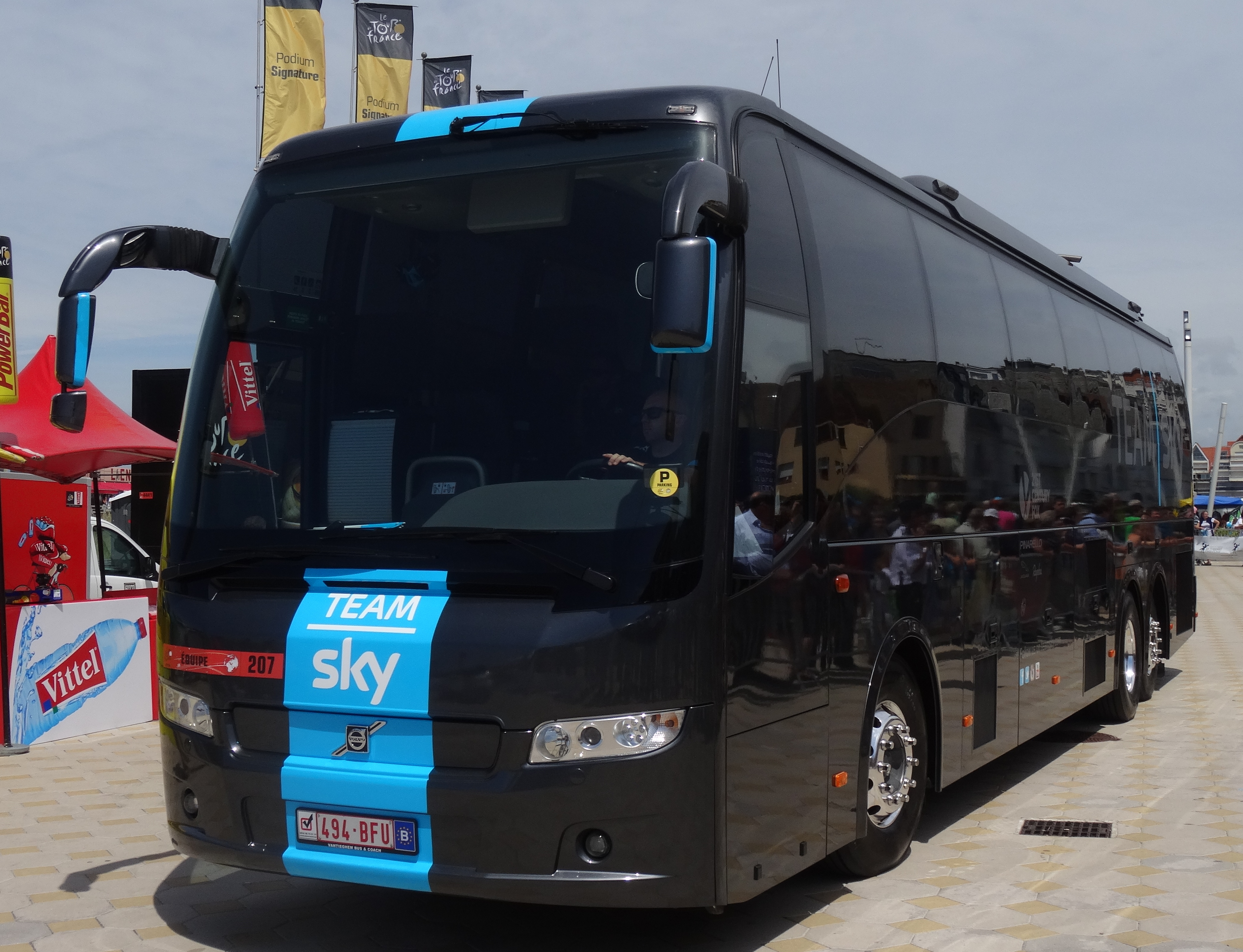 Reportage photographique réalisé le mardi 8 juillet à l'occasion du départ de la quatrième étape du Tour de France 2014 au Touquet-Paris-Plage, Nord-Pas-de-Calais, France.